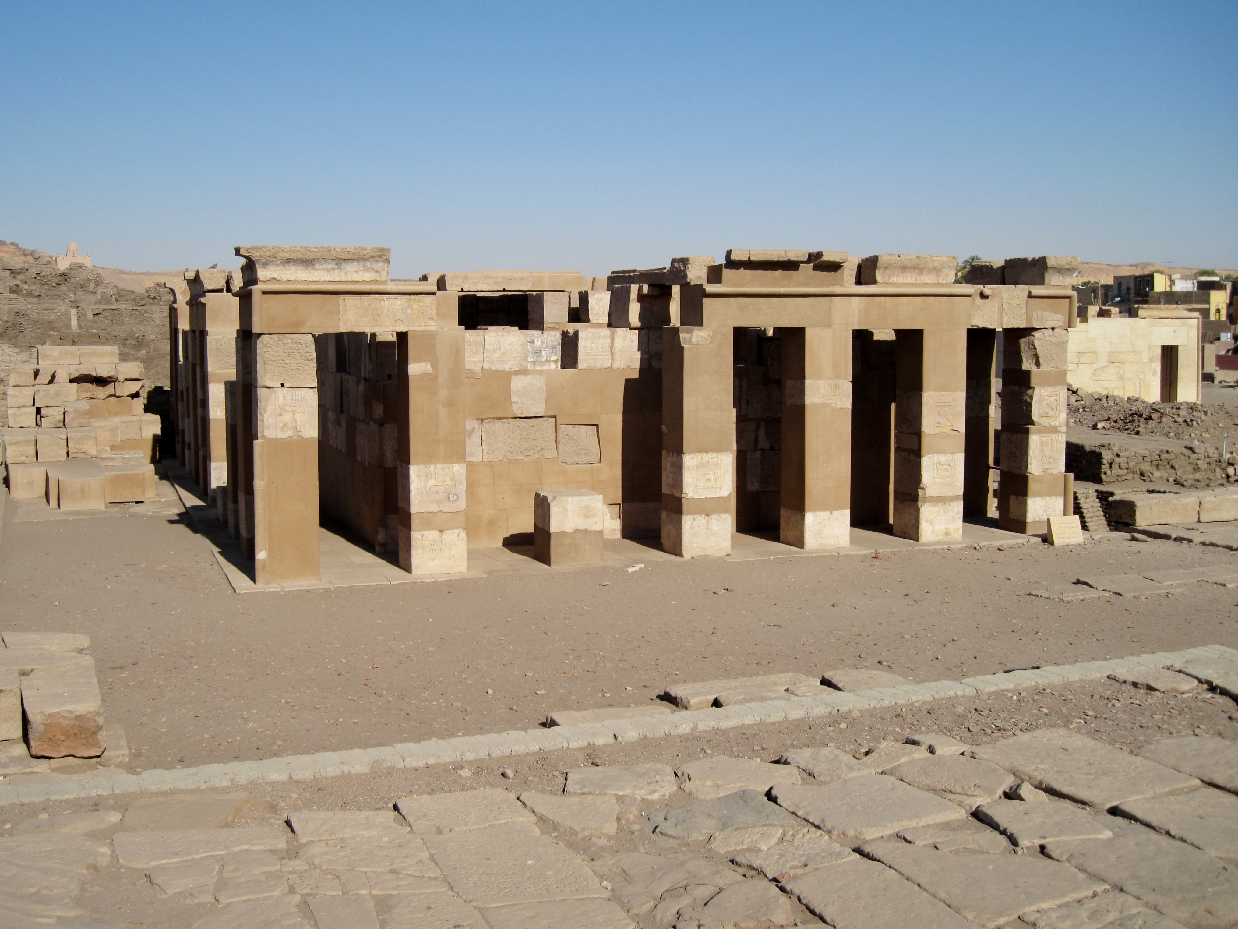 Satistempel der 18. Dynastie auf der Insel Elephantine in Assuan, Ägypten